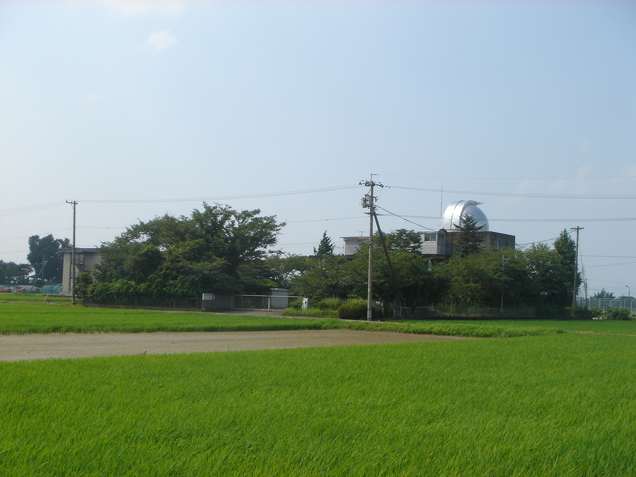 Gifu Tenmondai(Observatory)(岐阜天文台),Gifu,Gifu,Japan(岐阜県岐阜市)で撮影